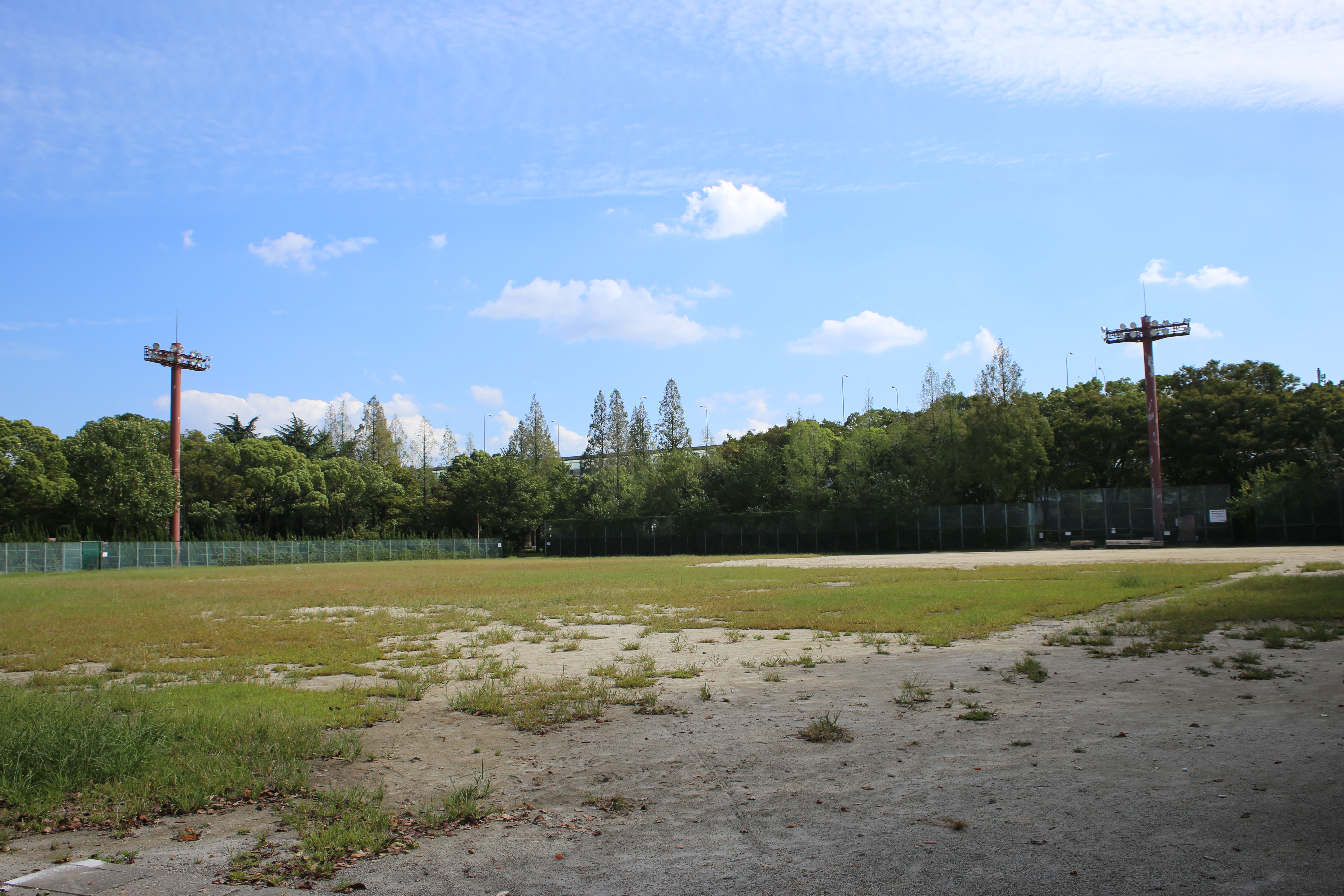 名古屋市北区若鶴町の楠公園